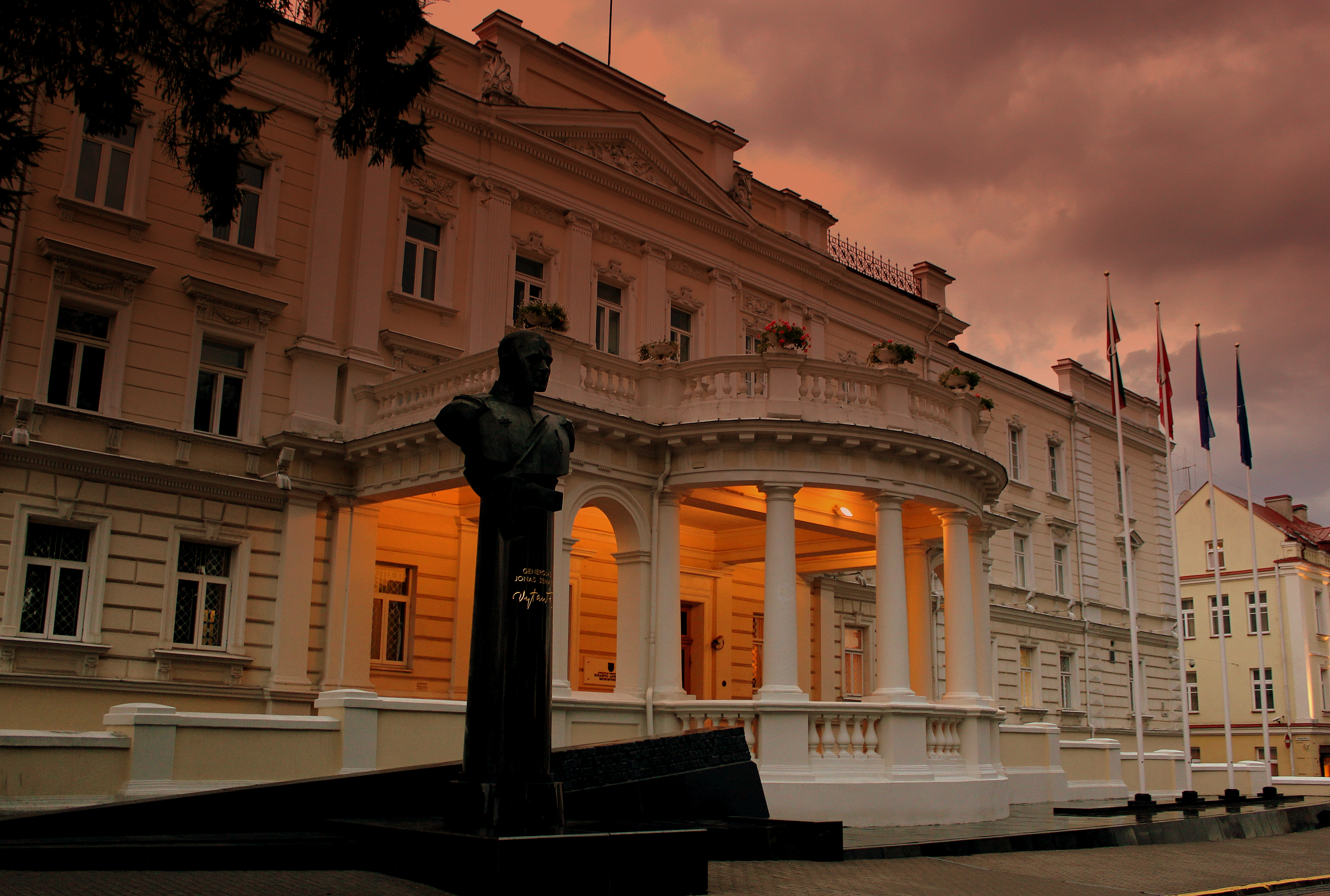 VILLINUS OLD TOWN LITHUANIA SEP 2013